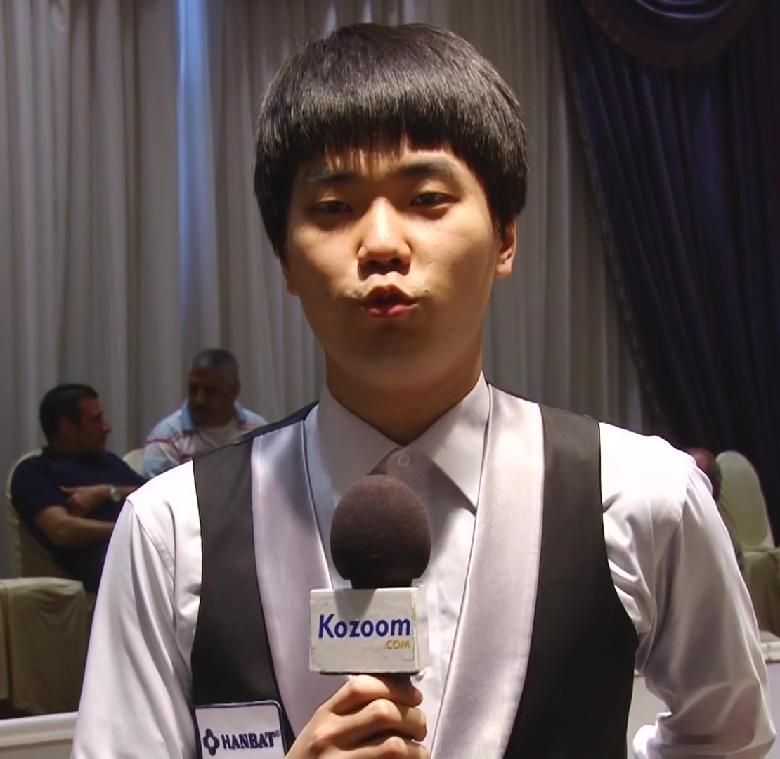 2015 룩소르 월드컵! 준결승 진출자 김행직 선수 인터뷰!